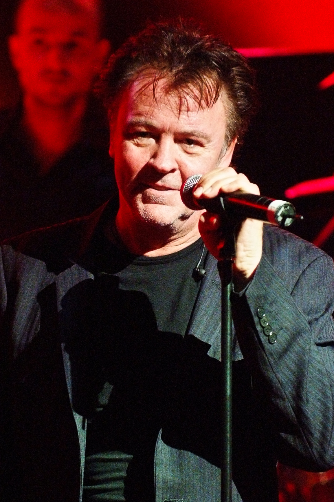 Kiel, Sophienhof, 24. Oktober 2009